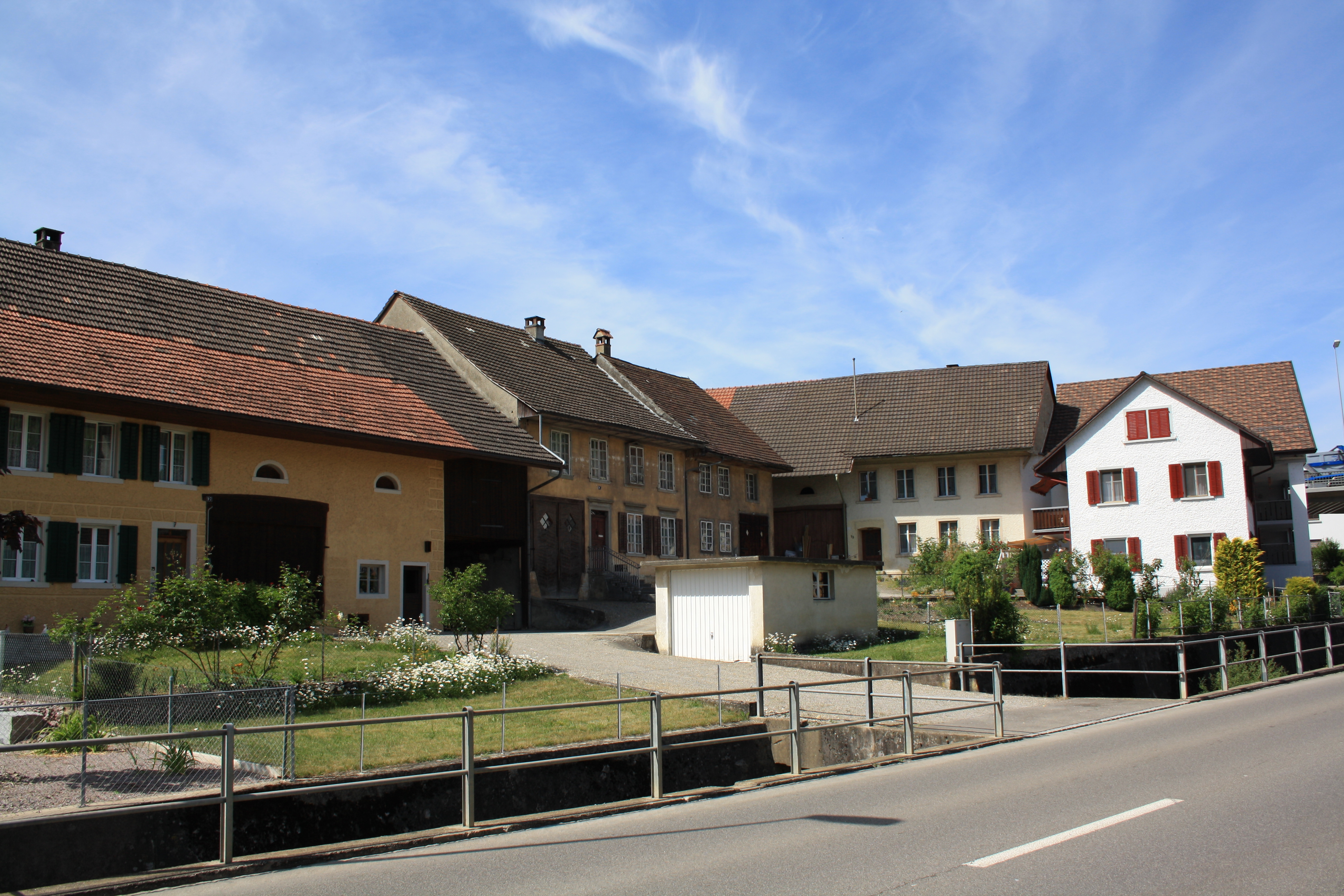 Häuser in Tegerfelden